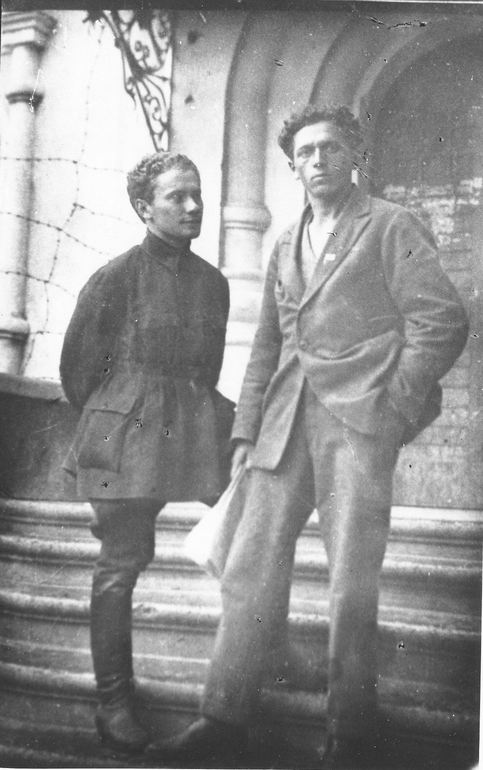 Анатоль Вольны (Ажгірэй) і Міхась Чарот (Кудзелька) (справа), Менск.